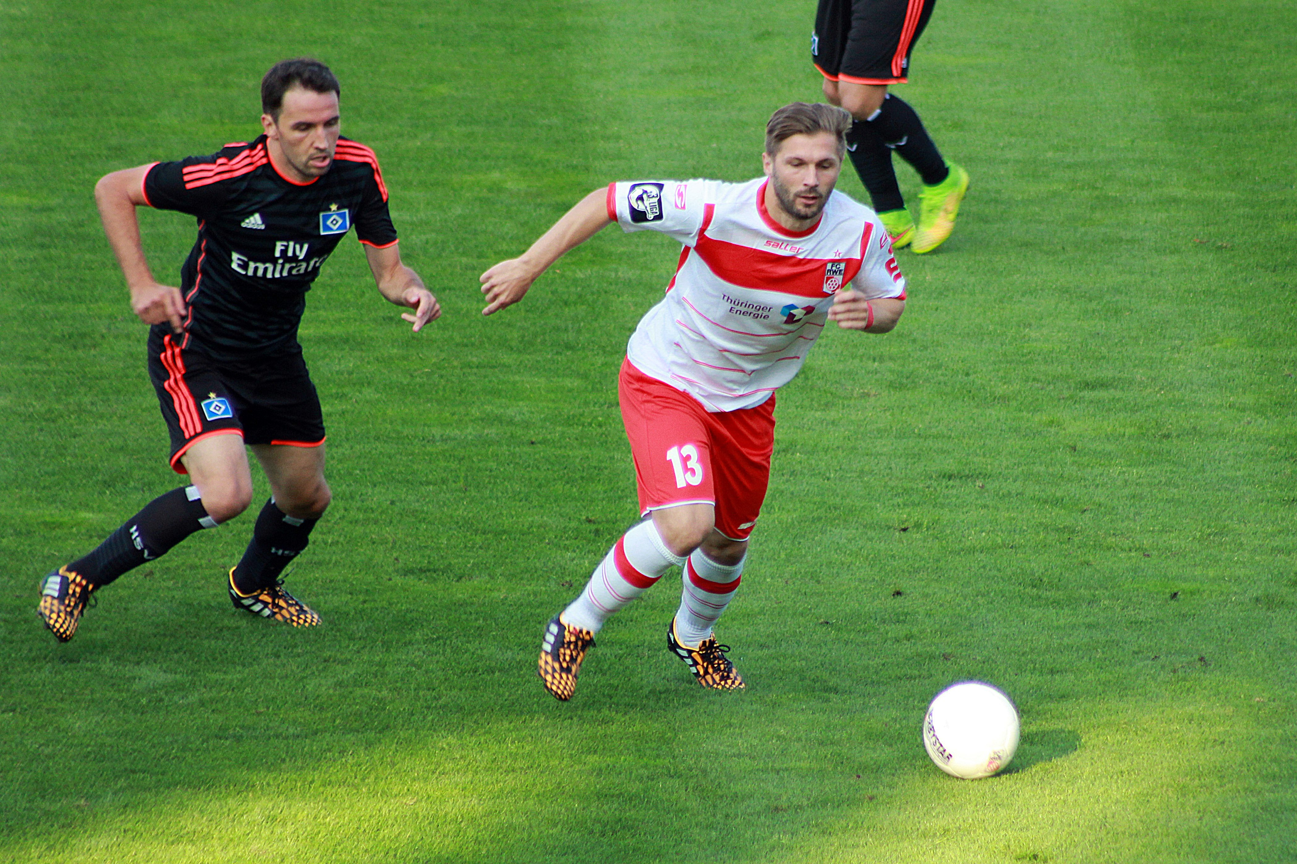 Sebastian Tyrała im Trikot des FC Rot-Weiß Erfurt, in einem Testspiel gegen Hamburger SV am 12. August 2014. Autor: Marcel Junghanns